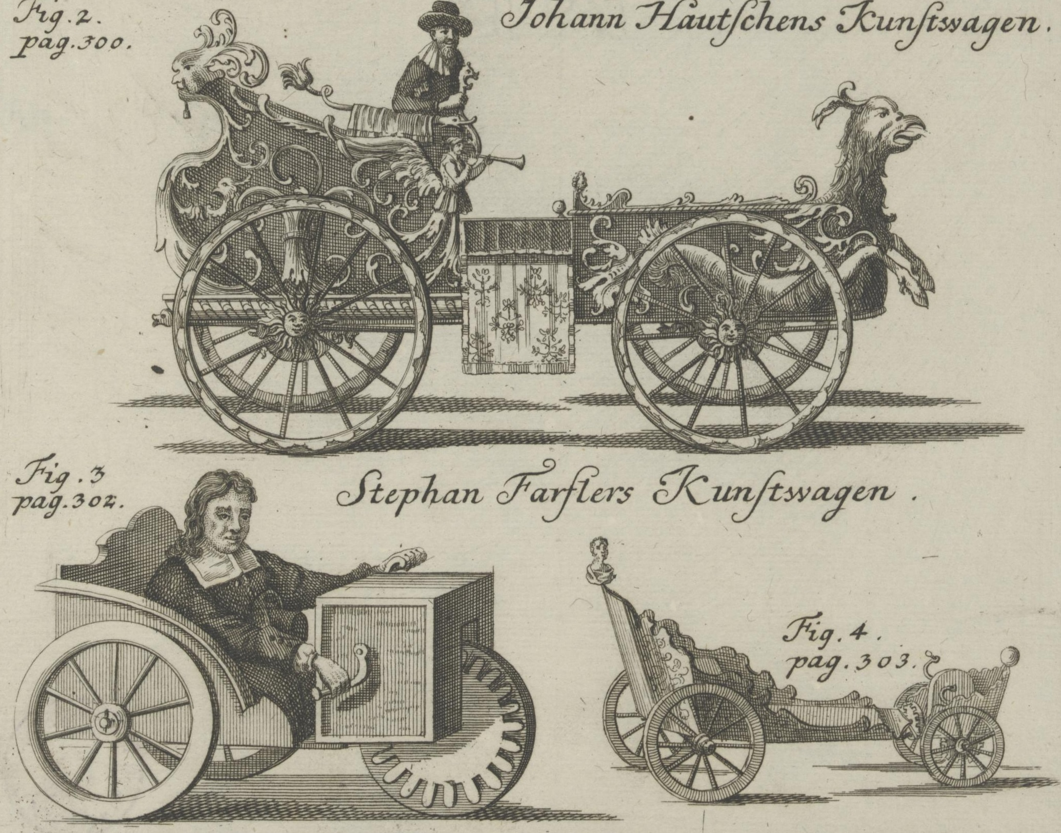 'Kunstwagens' - Geigen-Clavicymbel und Kunstwagen cropped (1680, und 1689)